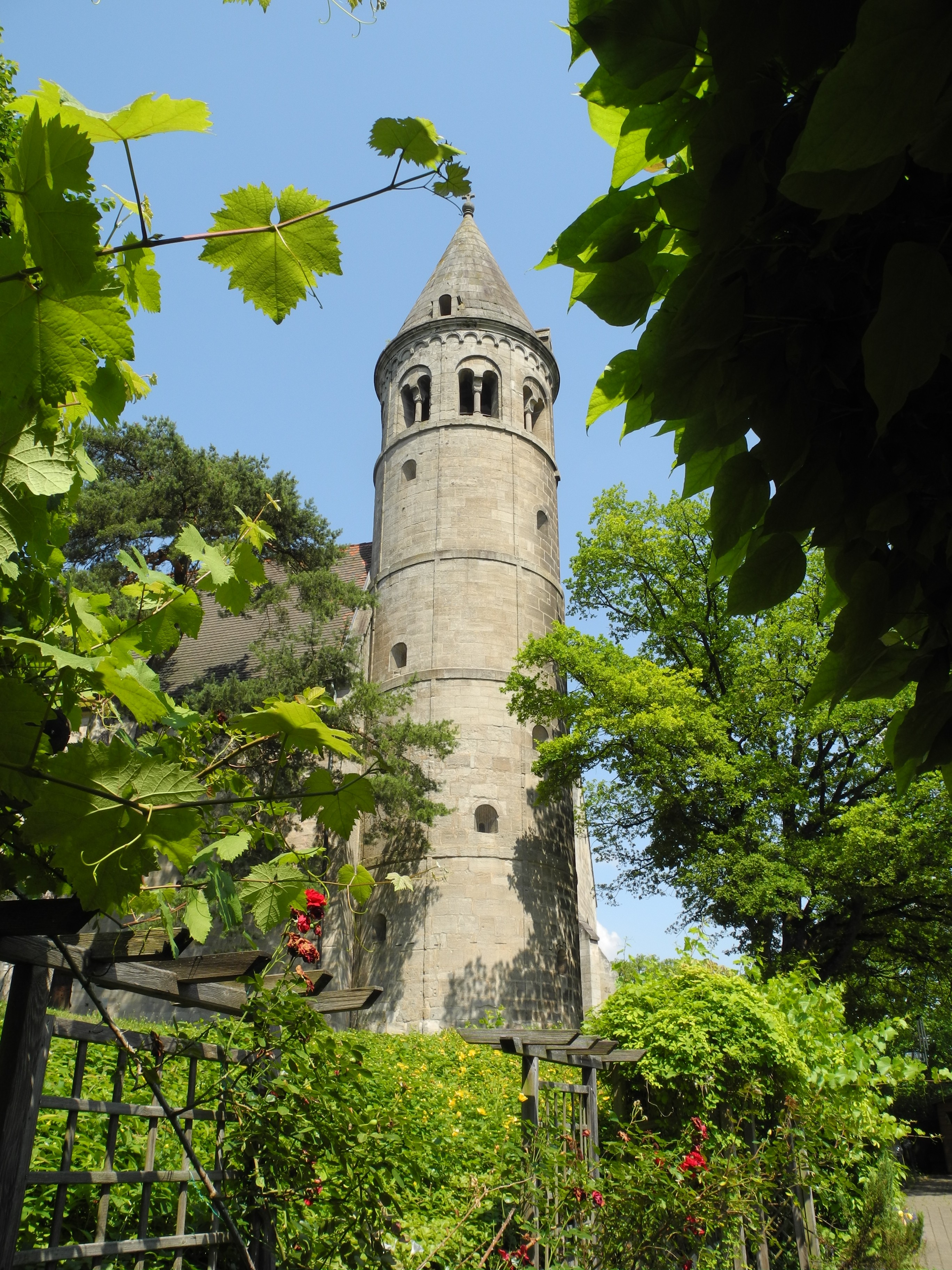 Lorch - Klostergarten mit Rundturm, rom.